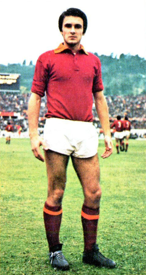 Il calciatore italiano Piergiorgio Negrisolo alla Roma all'inizio della stagione 1974-75, in posa all'interno dello stadio Olimpico di Roma.